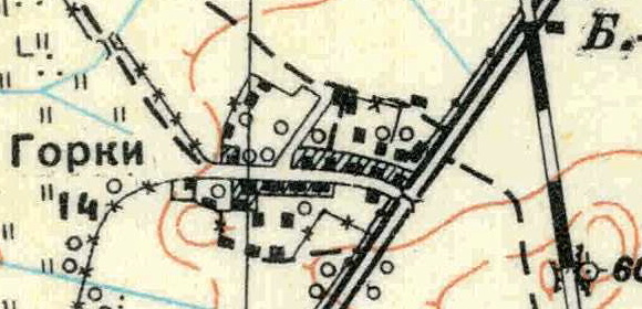 Топографическая карта Ленинградской области, квадрат О-35-22-Г-а (Керстово), деревня Горки.